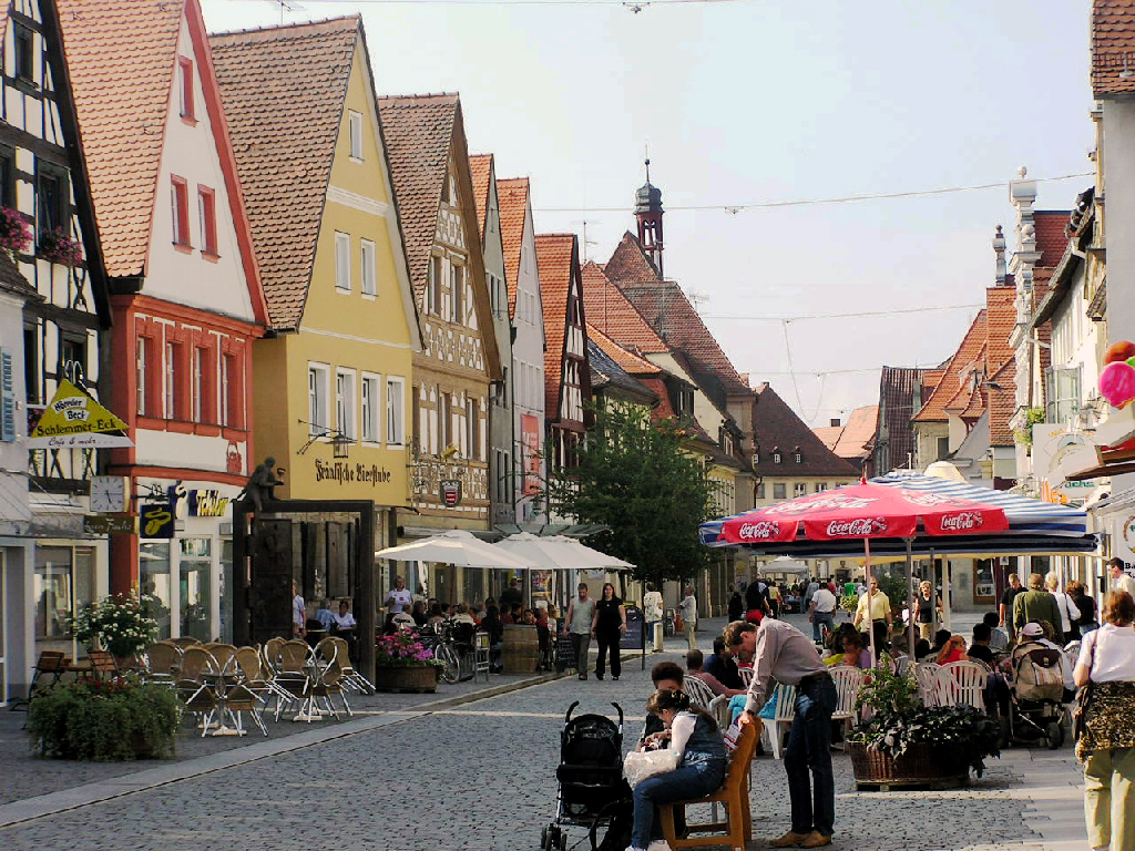 Description: Hauptstraße (Fußgägerzone) in Forchheim Source: selbst fotografiert Date: 15. August 2004 Author: Schubbay